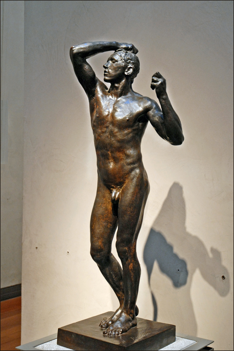 Auguste Rodin (Français, 1840-1917): L'Age d'airain ou L'homme qui s'éveille ou Le Vaincu, bronze fondu d'après l'oeuvre initiale datant de 1876/1877, Legs Jacqueline Delubac, 1997, Musée des Beaux-Arts de Lyon, France. Site du musée